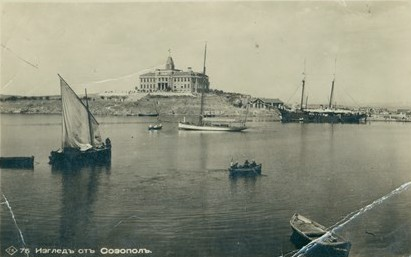 Морското училище на остров Свети Кирик, Созопол.